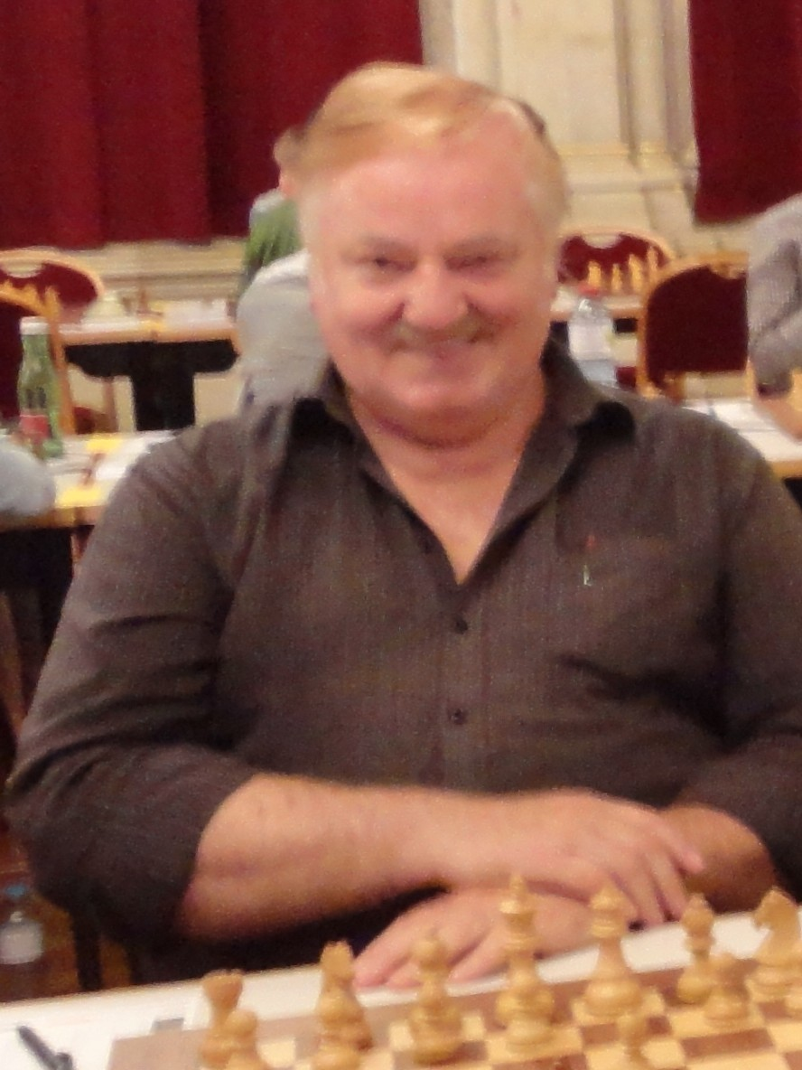 Georg Danner, Vienna Chess Open 2015 in Wien, Runde 4.